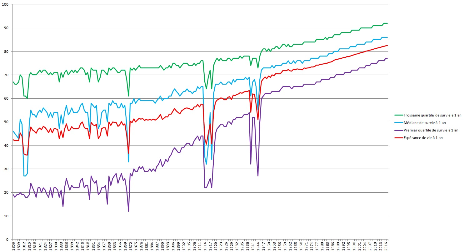 Évolution de l'espérance de vie et des quartiles de survie à 1 an en France de 1806 à 2017 (Source: INED) Définitions: - Espérance de vie à 1 an: âge moyen de décès pour les personnes ayant survécu à leur 1er anniversaire. - Premier quartile de survie à 1 an: âge à partir duquel 25% de la population ayant survécu à leur 1er anniversaire est morte. - Médiane de survie à 1 an: âge à partir duquel 50% de la population ayant survécu à leur 1er anniversaire est morte. - Troisième quartile de survie à 1 an: âge à partir duquel 75% de la population ayant survécu à leur 1er anniversaire est morte.